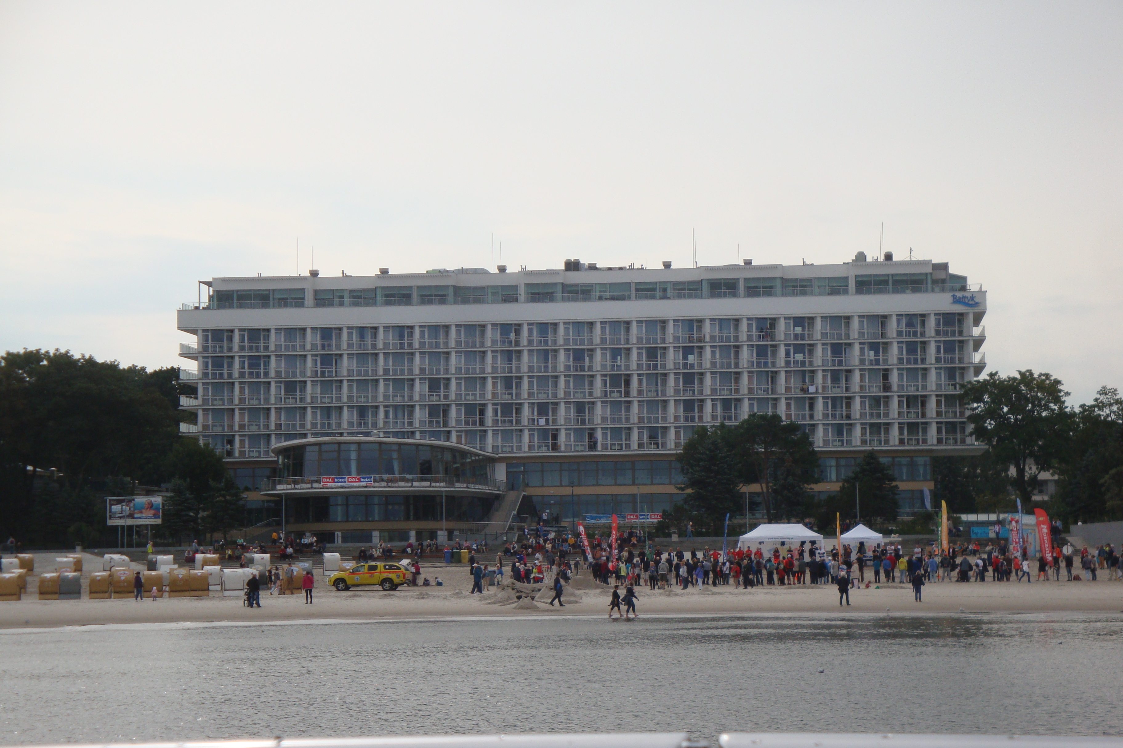 Sanatorium "Bałtyk" w Kołobrzegu fot M Z Wojalski